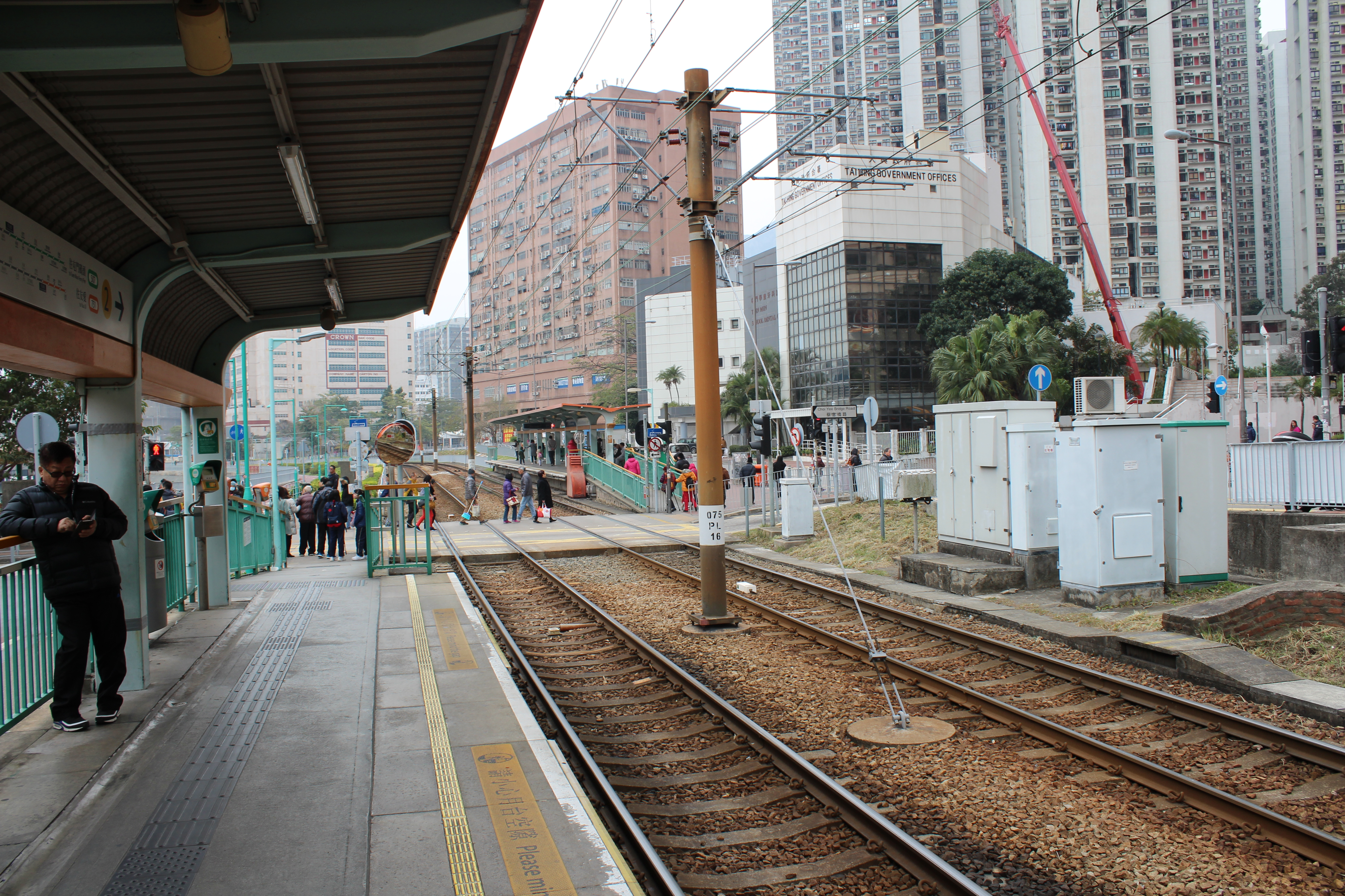 蔡意橋站月台